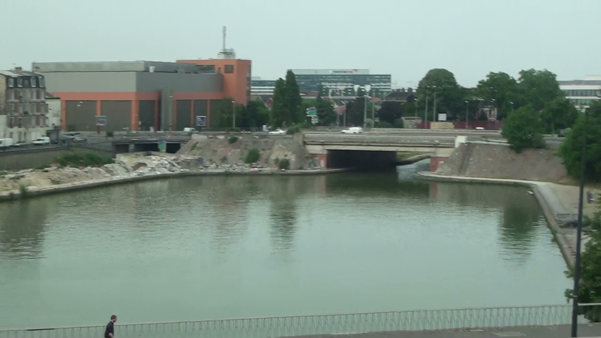 初到巴黎